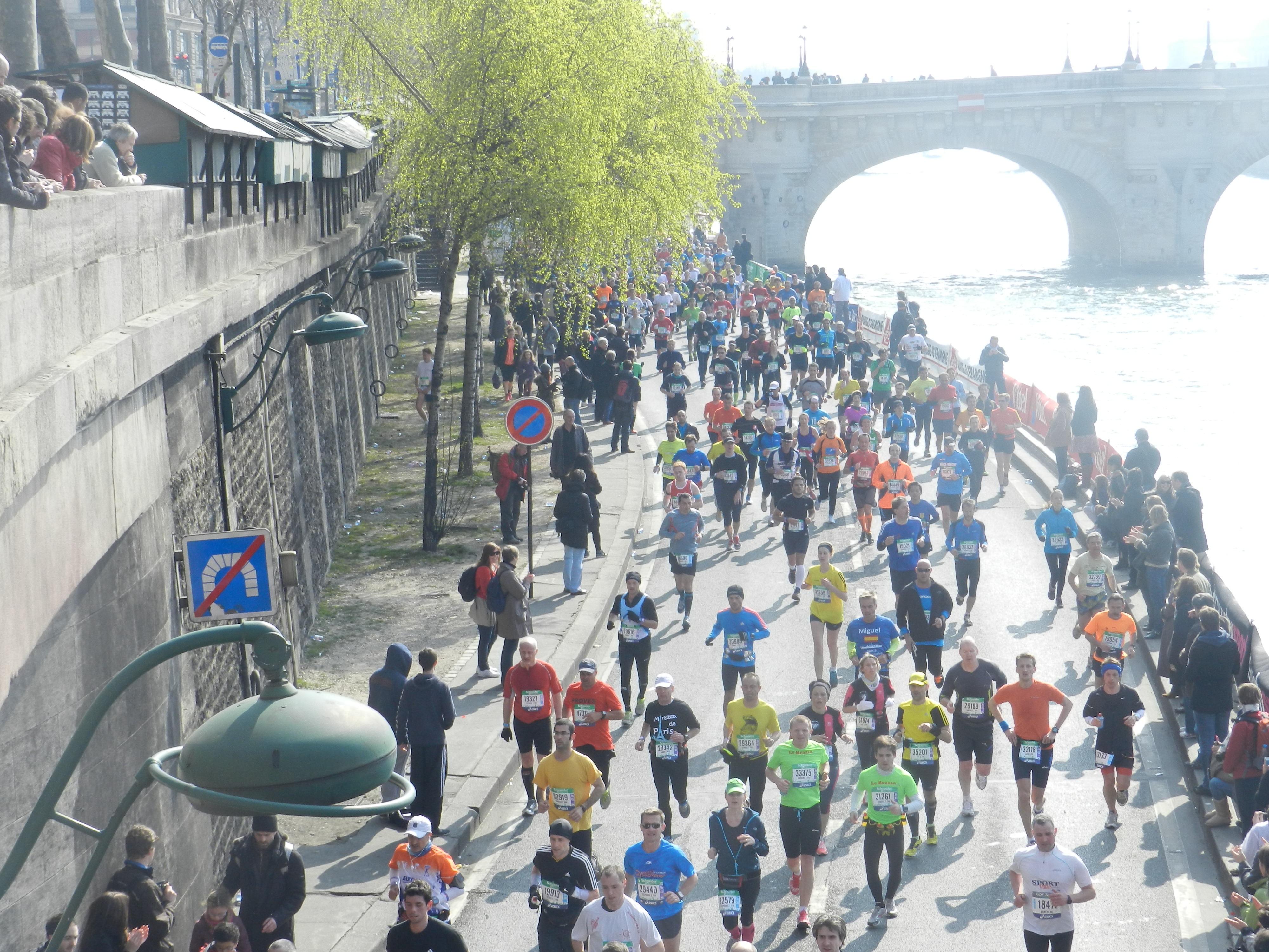 Coureurs de l'édition 2013 du marathon de Paris, derrière eux, se situe le Pont Neuf.